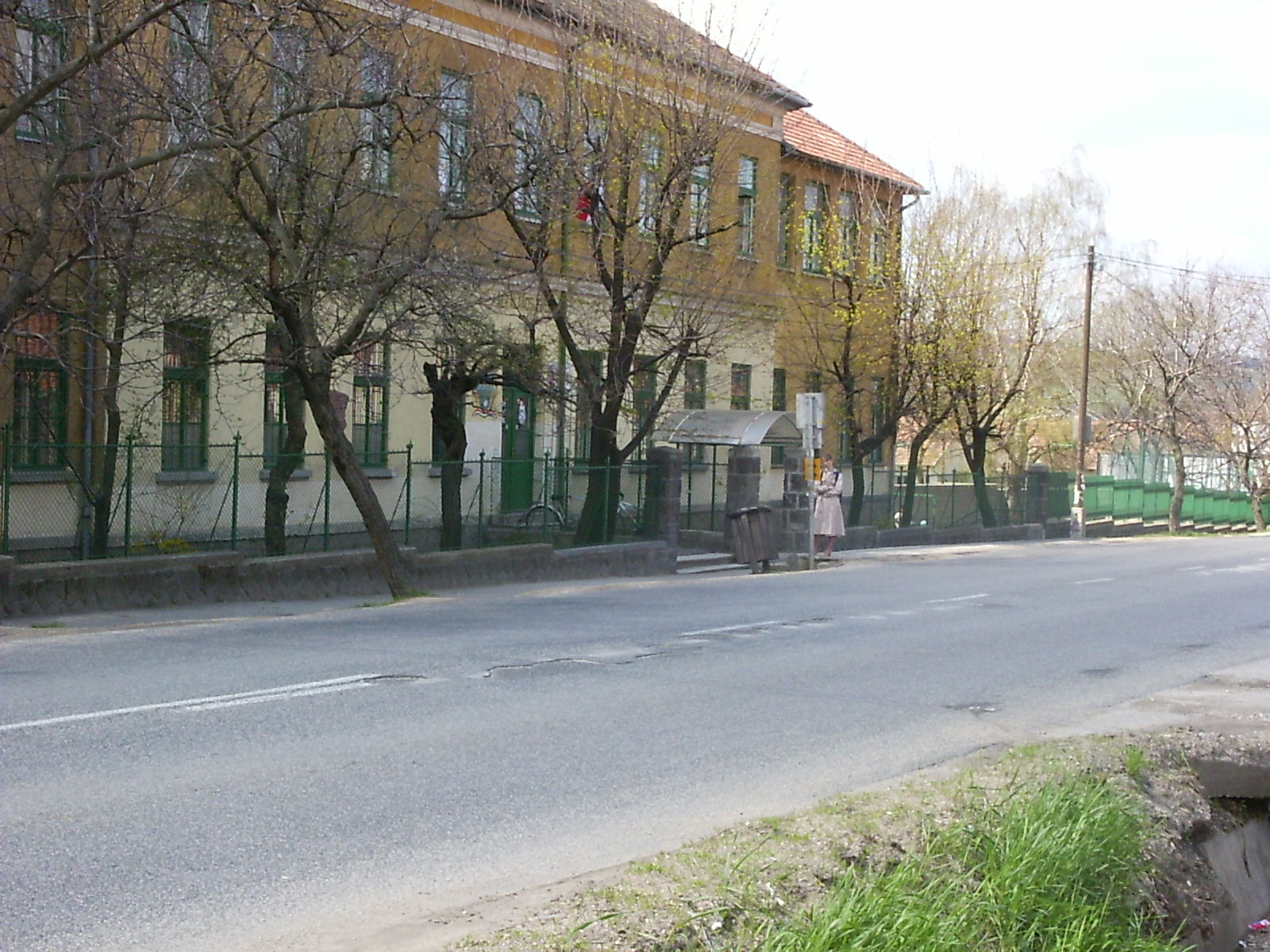 Piliscsaba, általános iskola